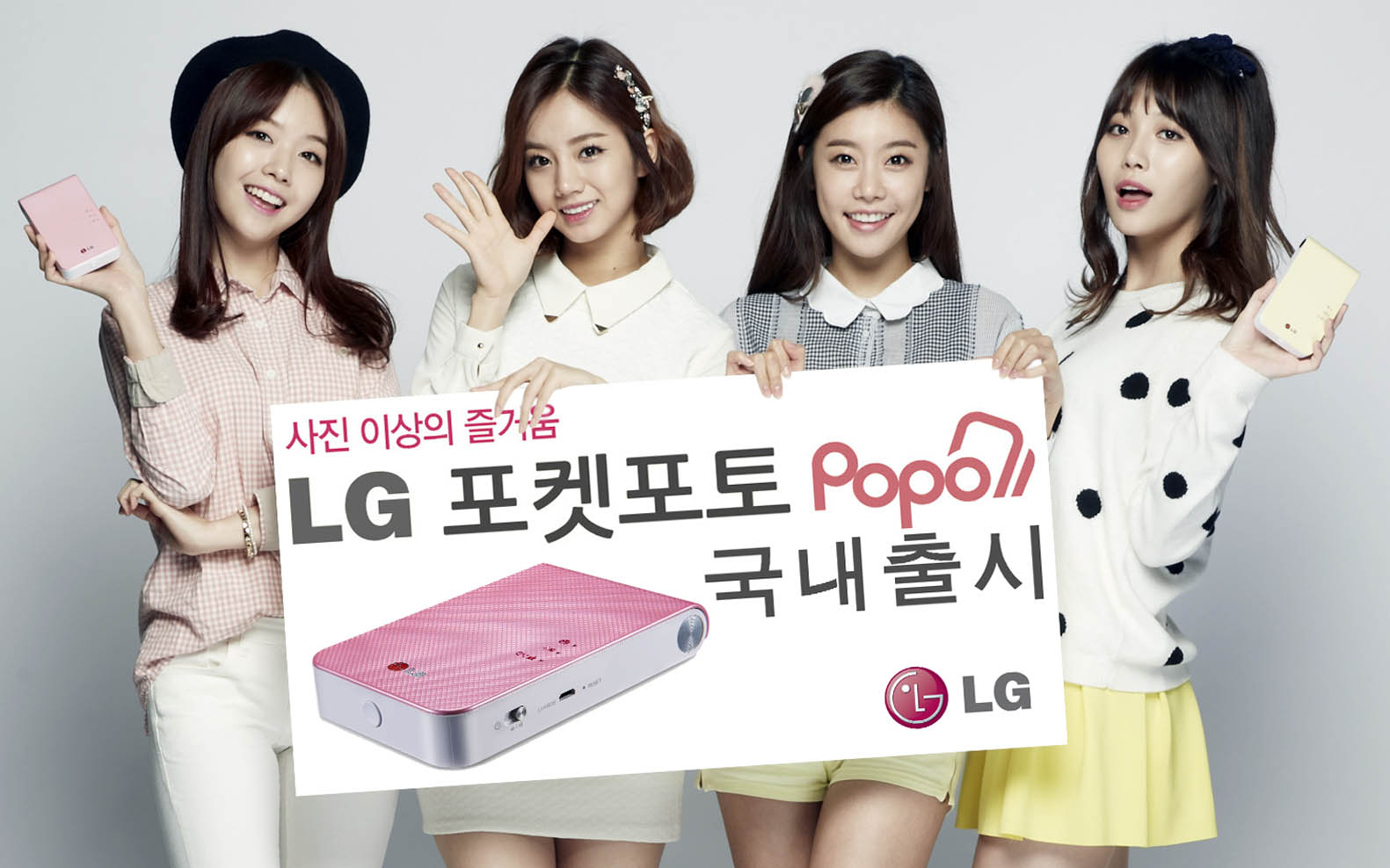 LG전자가 15일부터 초소형 모바일 프린터 ‘14년형 포켓포토’를 국내 시장에 출시한다. LG 포켓포토 공식 모델인 '걸스데이'가 제품을 들고 포즈를 취하고 있다. ※ Social LG전자 에서 관련 보도자료를 확인하실 수 있습니다.